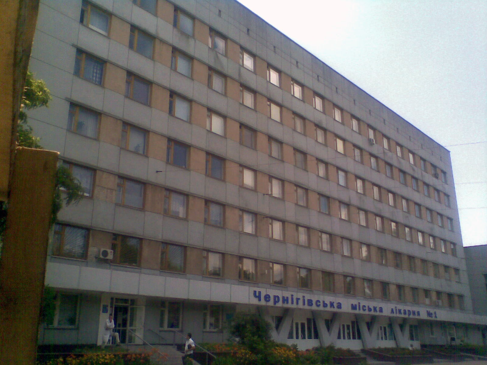 Черниговская городская больница №1.